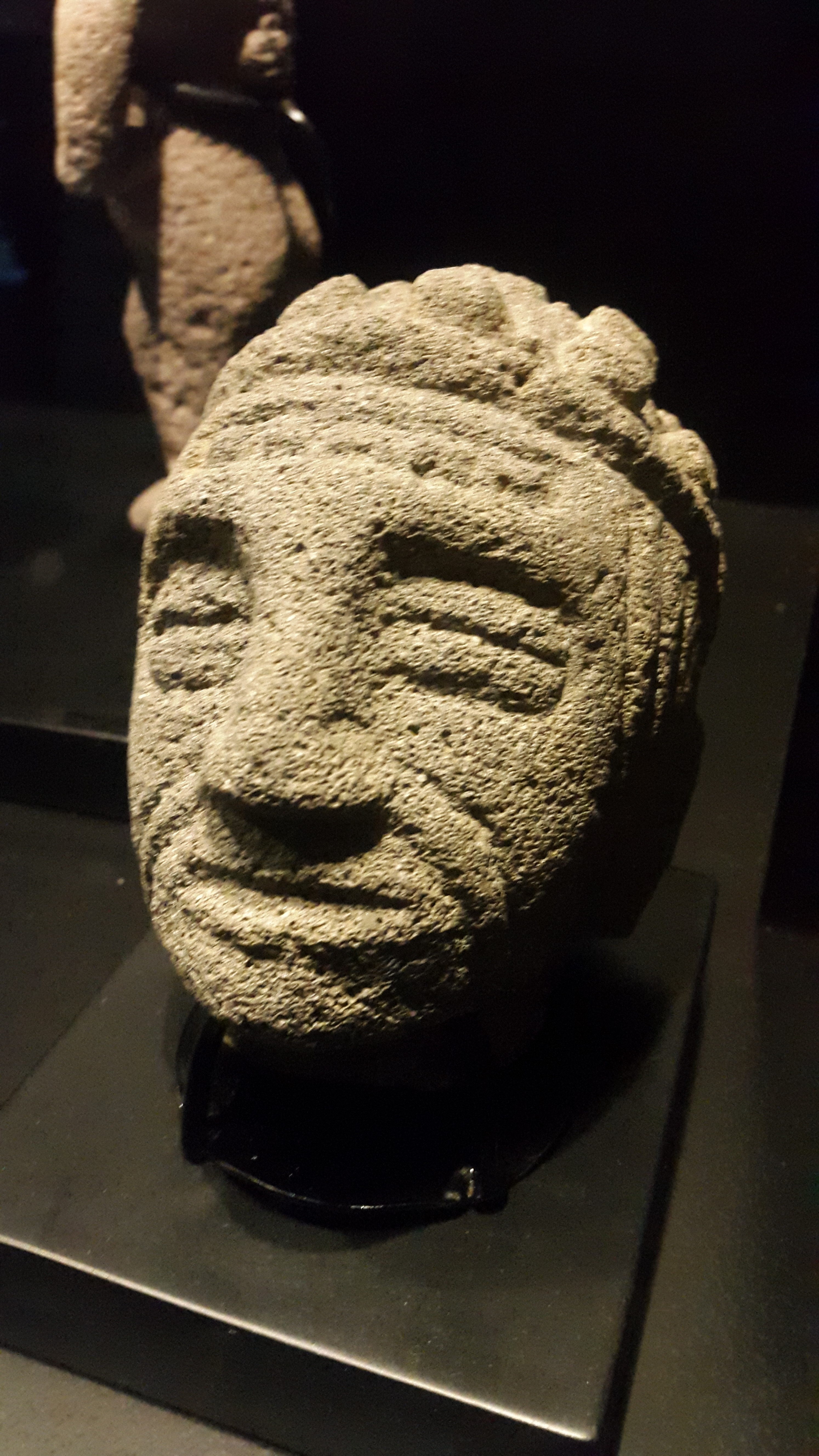 Cabeza trofeo de piedra volcánica, región Central de Costa Rica. Museo del Jade.